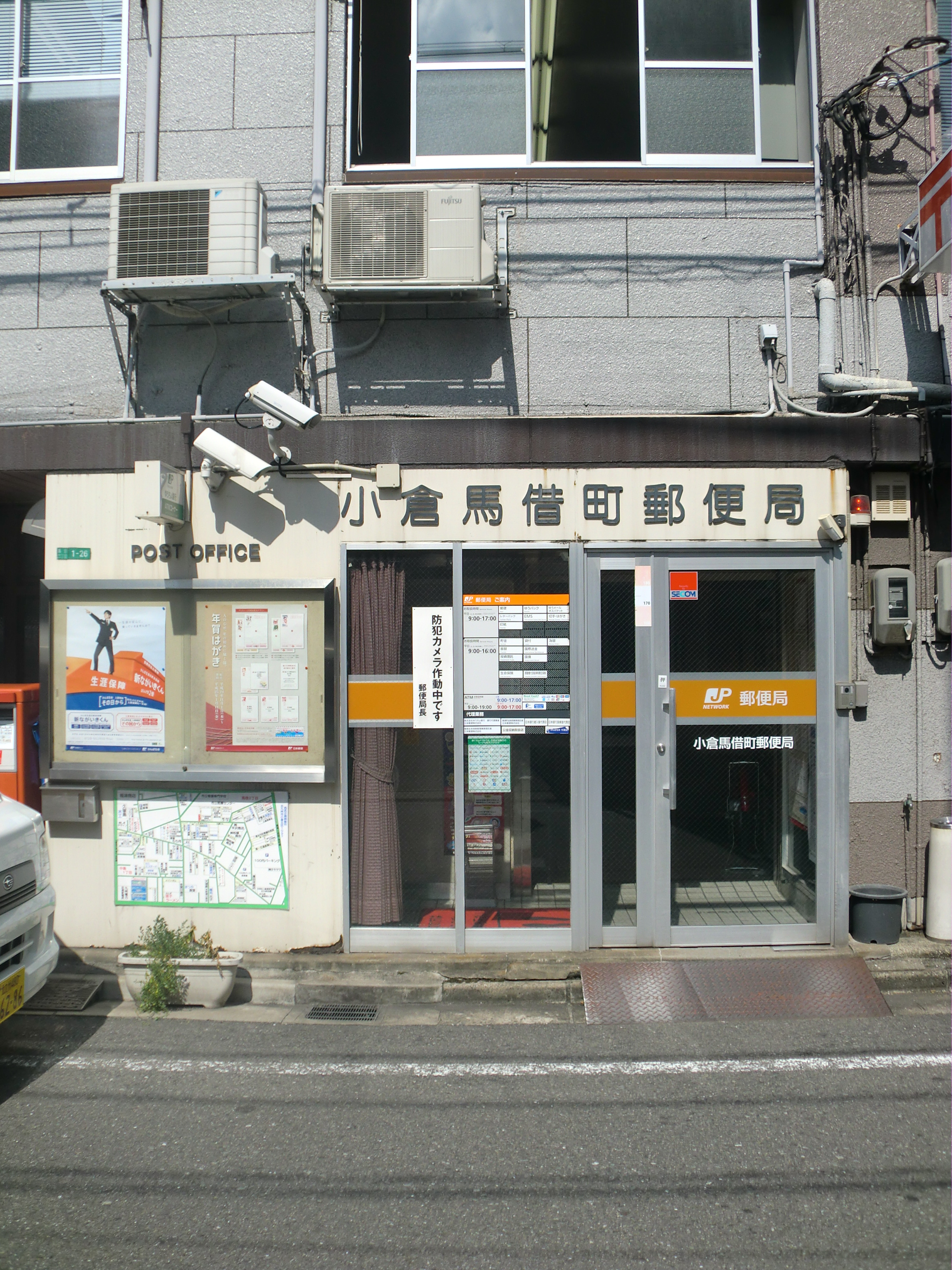 北九州市小倉北区にある小倉馬借町（こくらばしゃくまち）郵便局